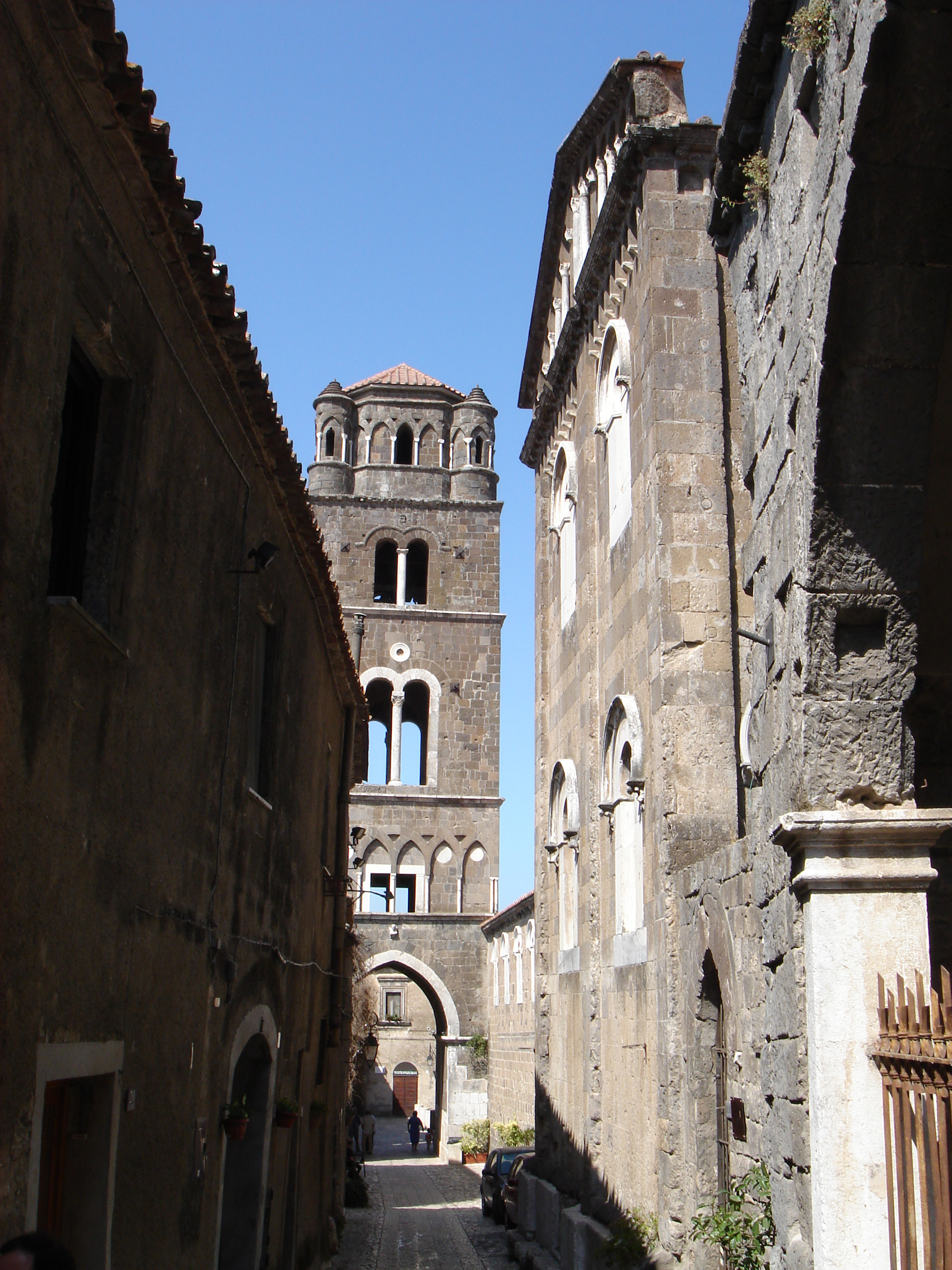 Vista de la calle que lleva a la catedral de Casertavecchia